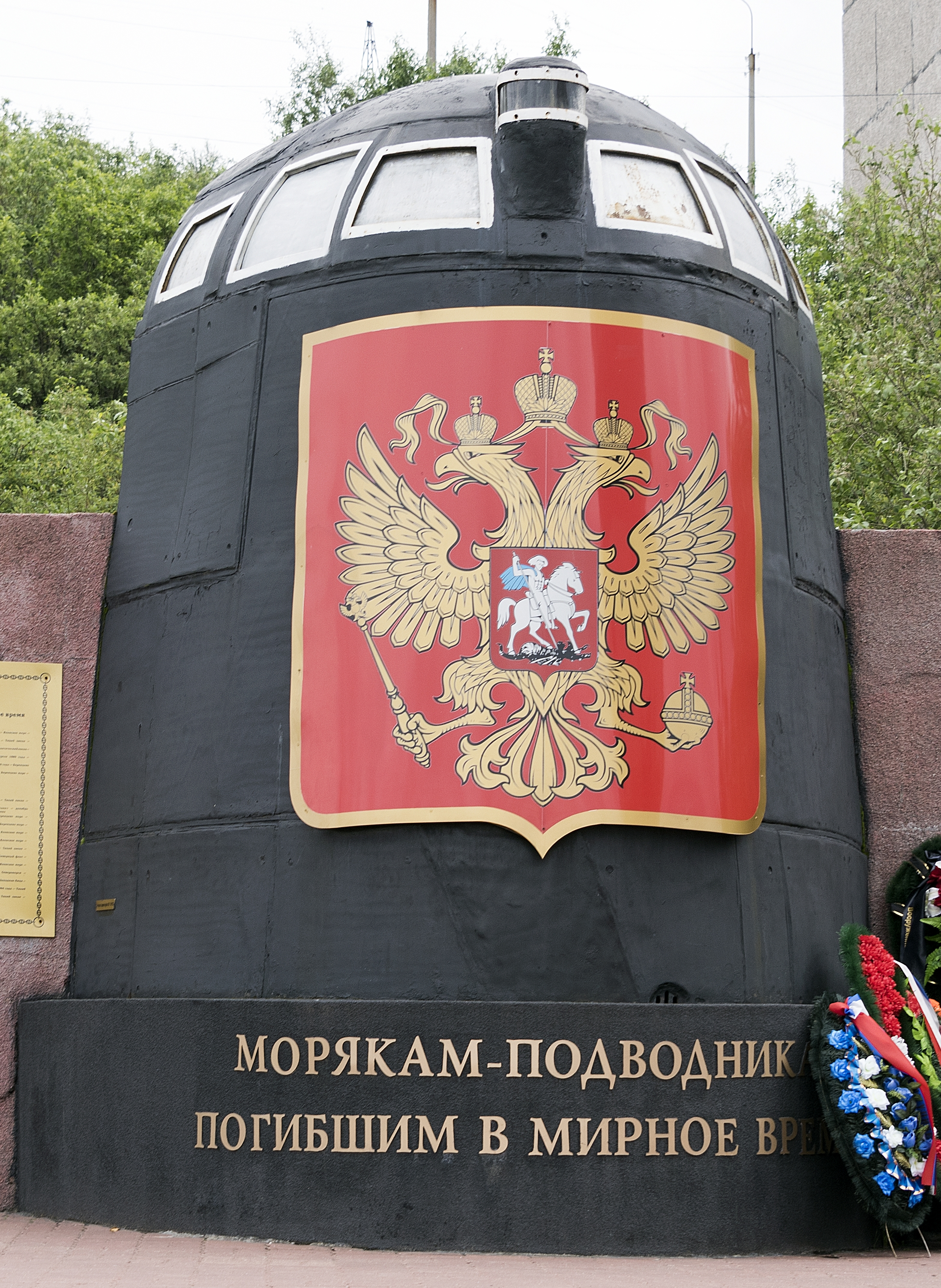 Рубка АПЛ "Курск" в Мурманске